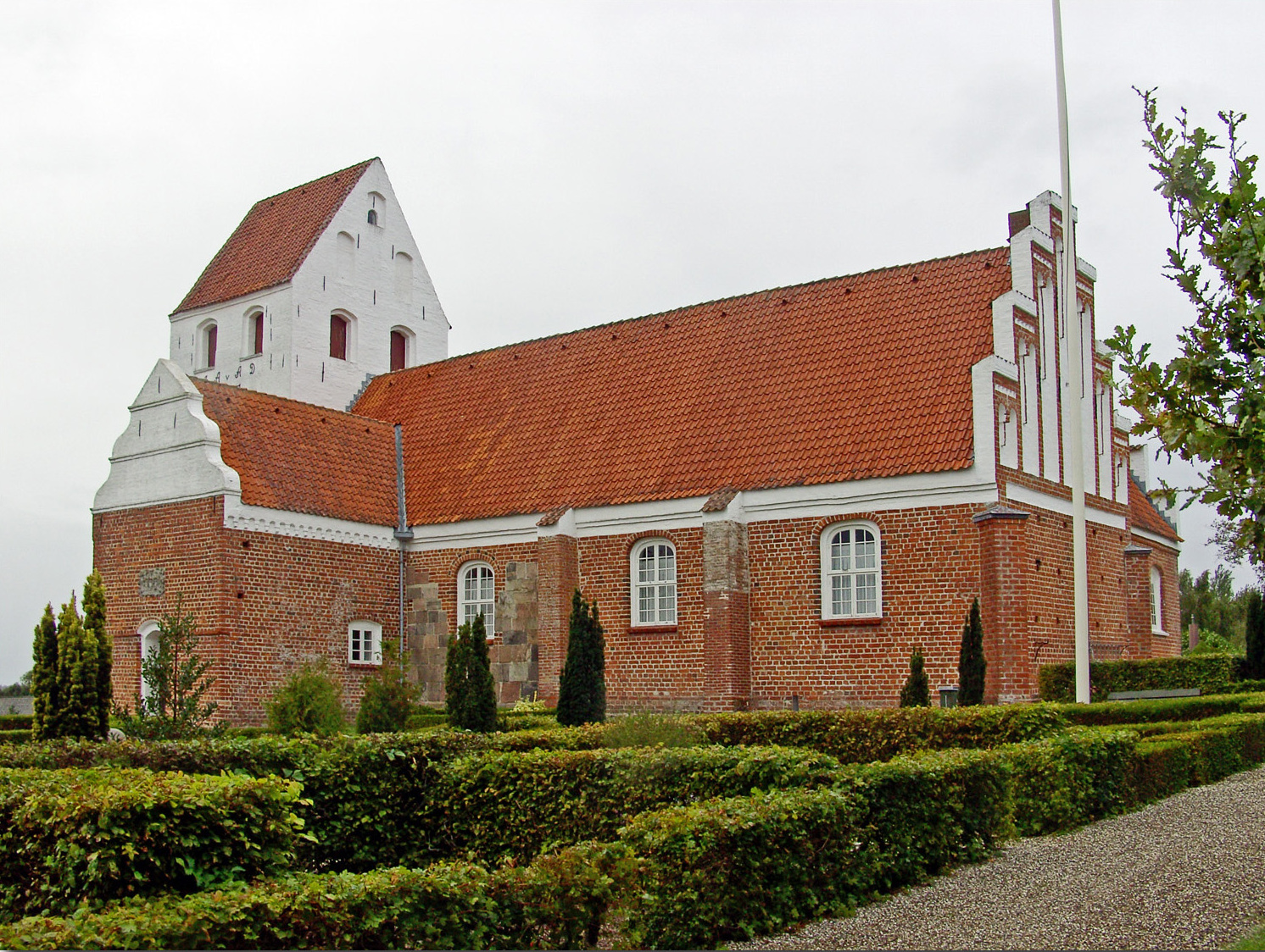 fra sydøst